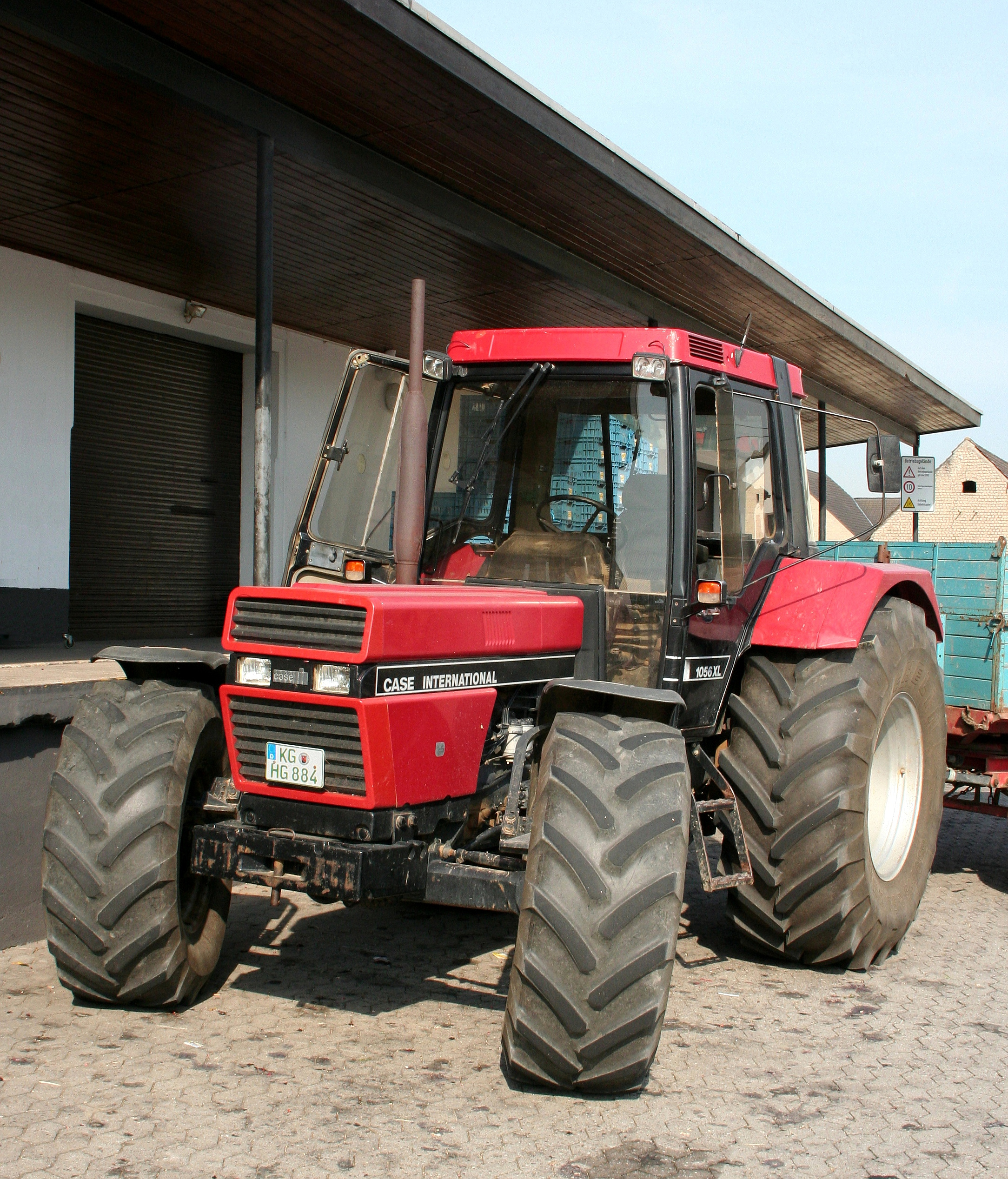 Traktor Case International 1056 XL in Deutschland